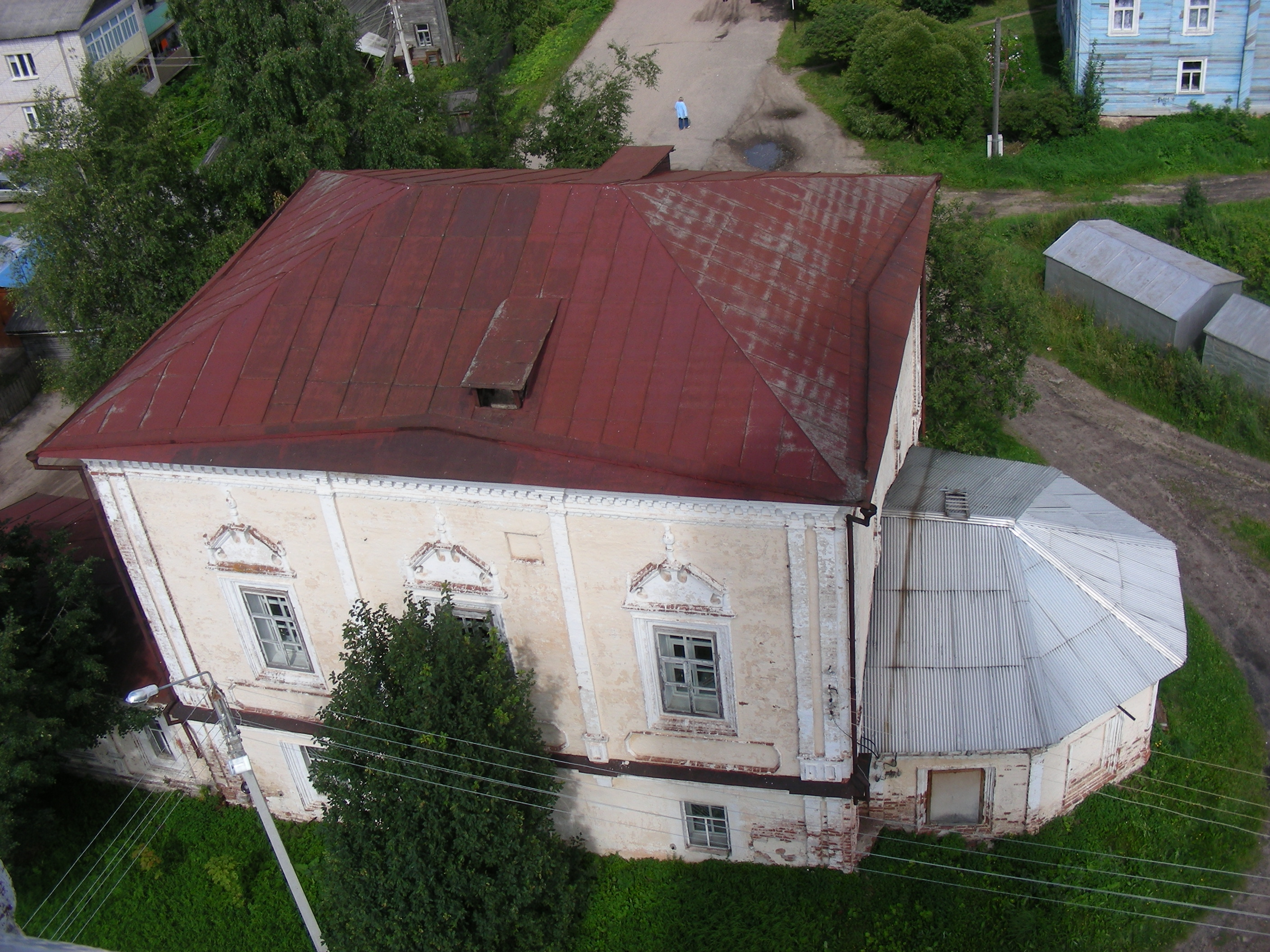 Церковь Воскресения Христова в Тотьме. Вид с колокольни Успенской церкви